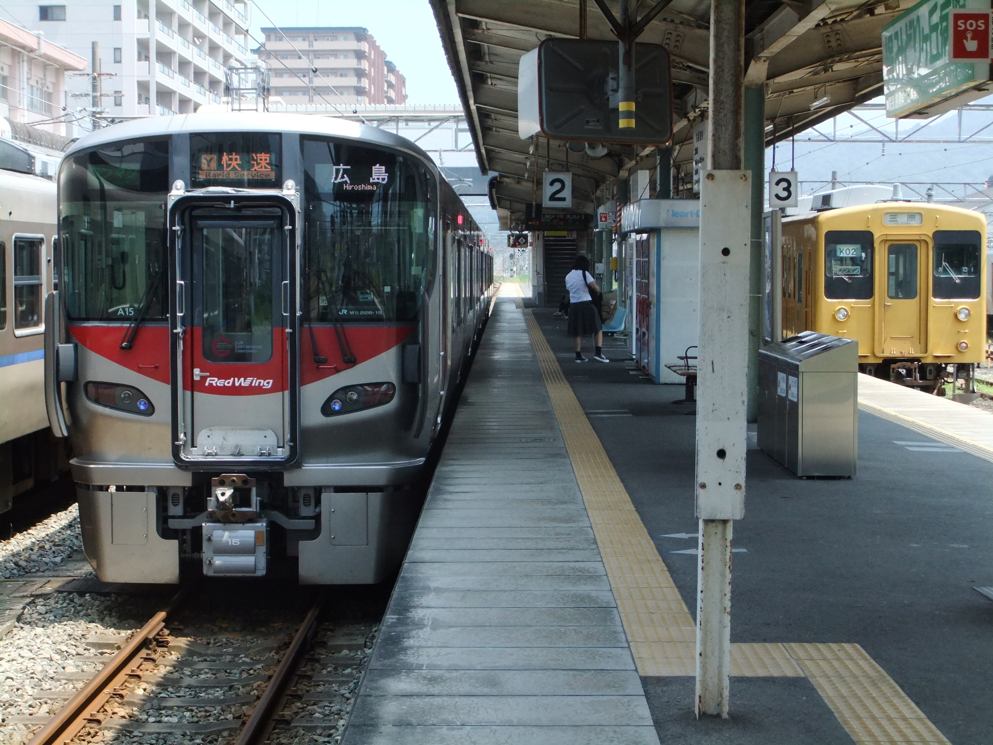 快速「安芸路ライナー」と呉線普通列車 呉駅